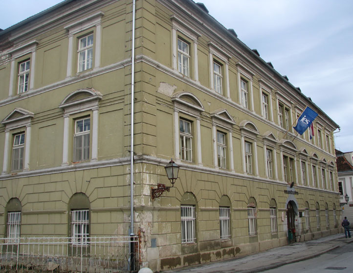 Palača Generalata - Kadetske škole u Karlovcu, danas zgrada Veleučilišta u Karlovcu